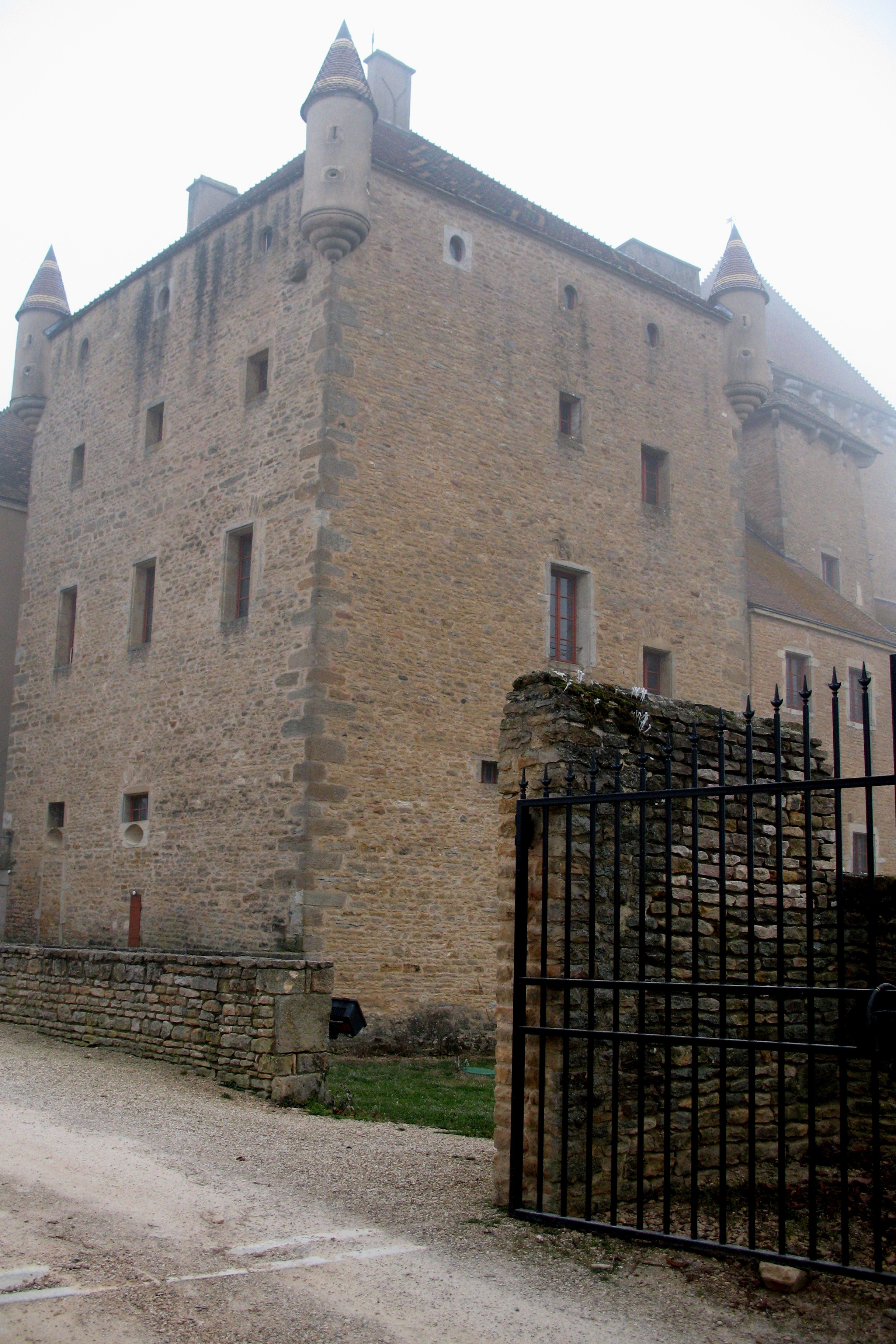 château de Pierreclos (Saône-et-Loire)